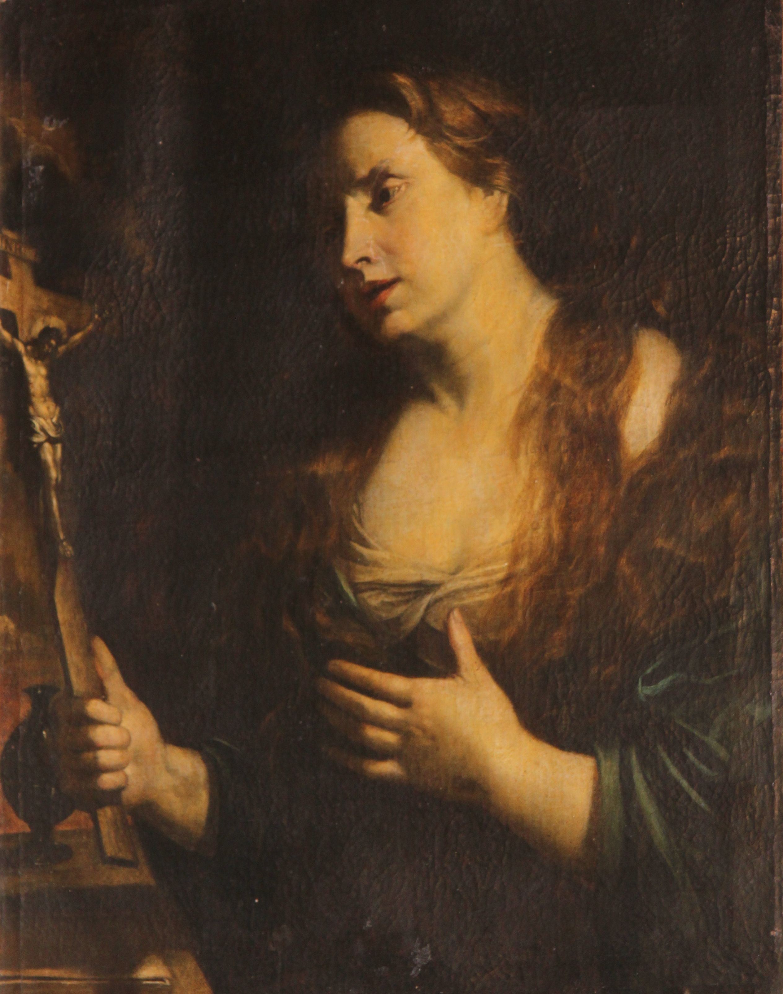 Correspondiente a la etapa mantuana del pinto por las influencias de la obra de Rubens y el cromatismo de la pintura veneciana en la citada obra. Donada por Fernando del Hoyo y Machado.